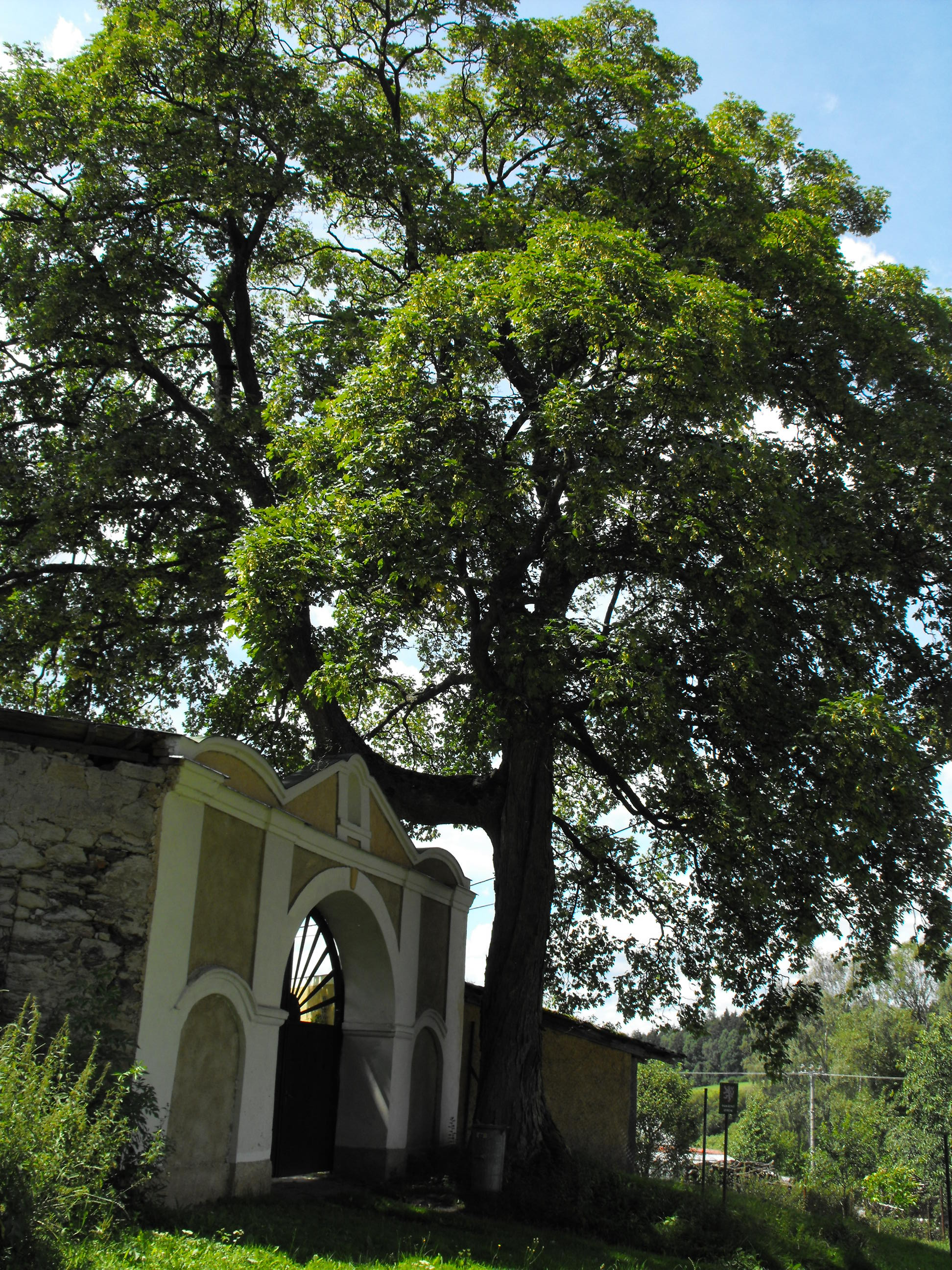 Památný strom ve Starém Sedle u brány č.p. 12